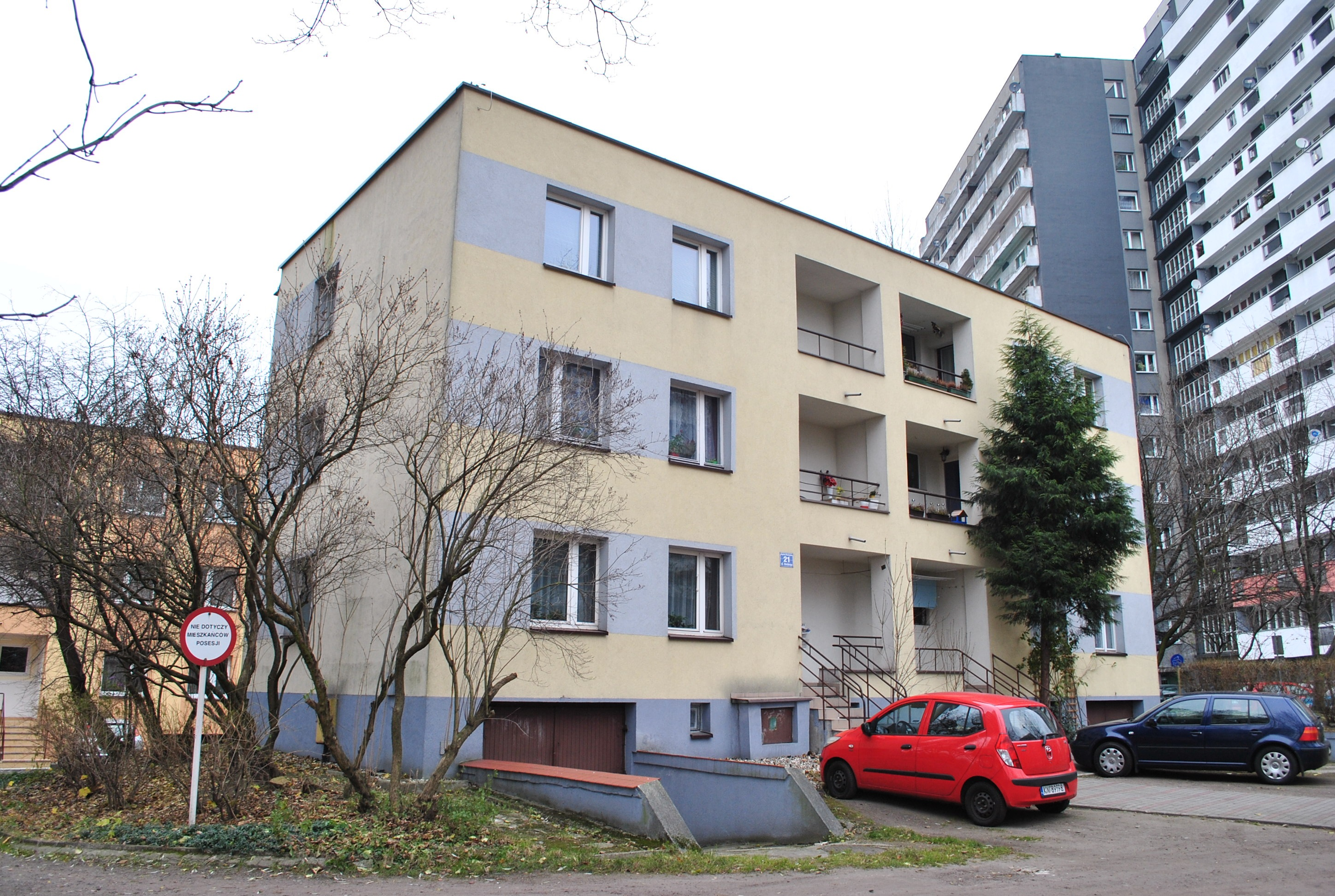 Katowice, Osiedle Tysiąclecia. Niskie bloki przy ul. Chrobrego